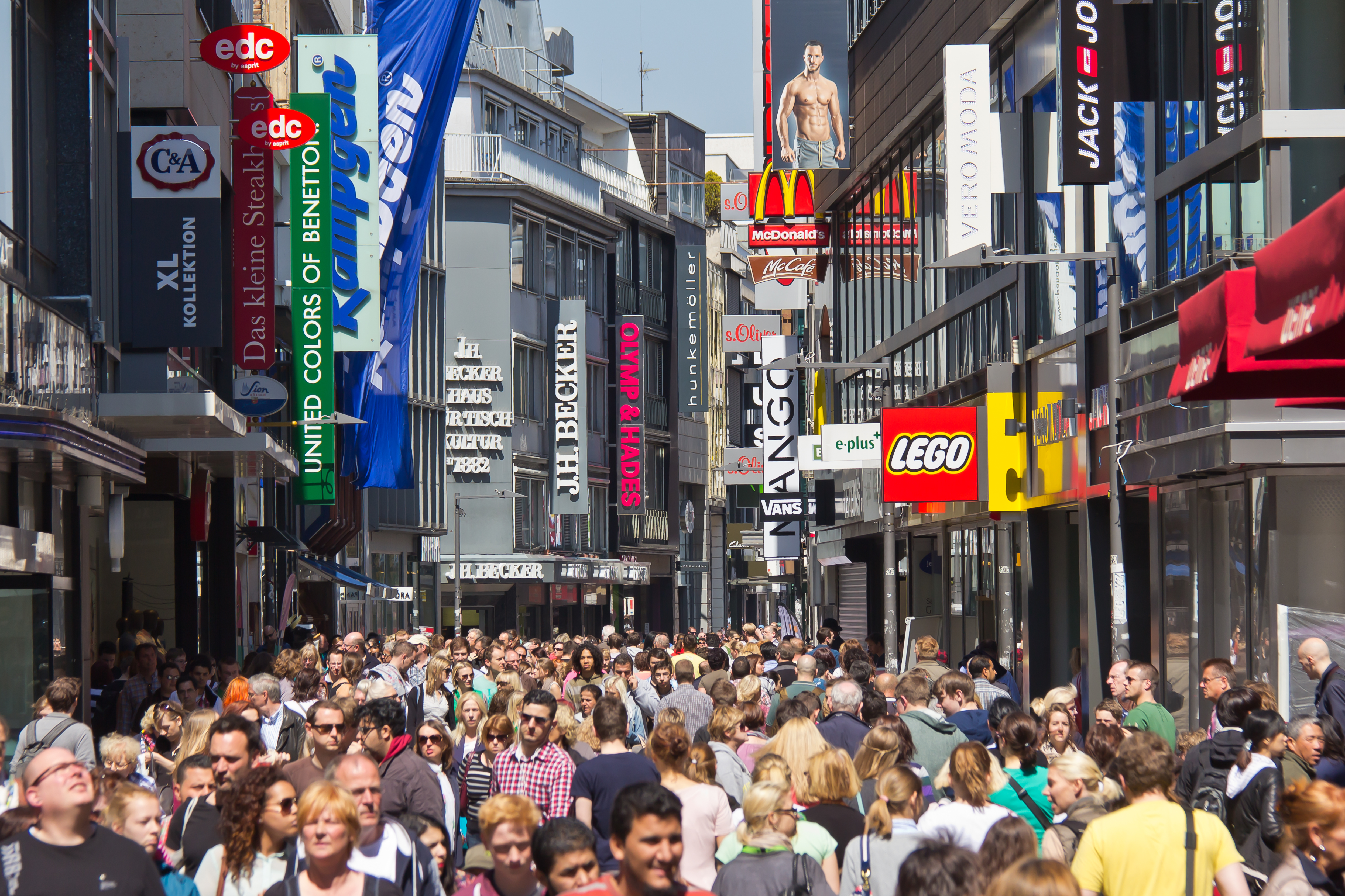 Fußgängerzone Hohe Straße in Köln